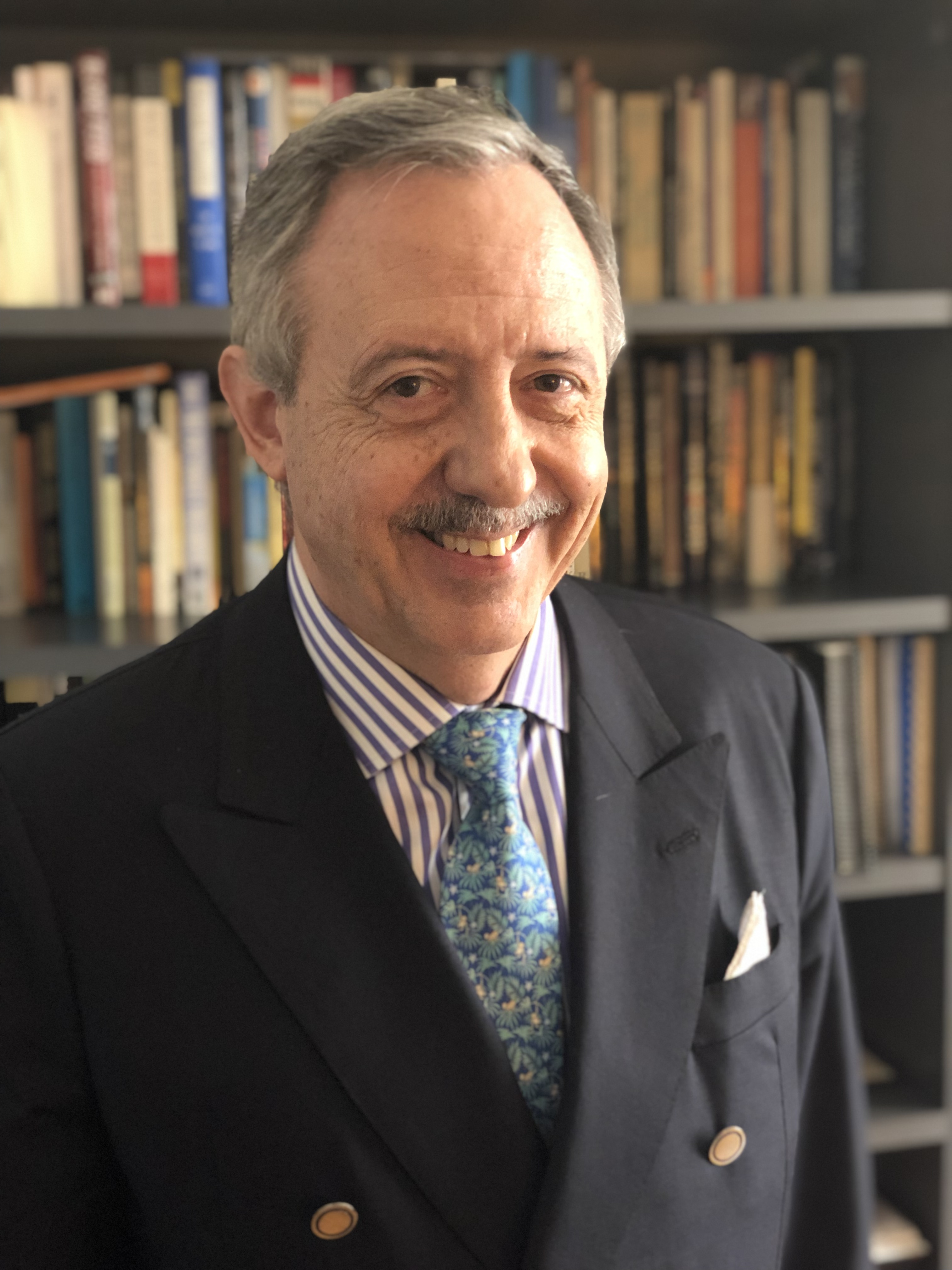 Guillermo Hunt, Embajador Argentino.